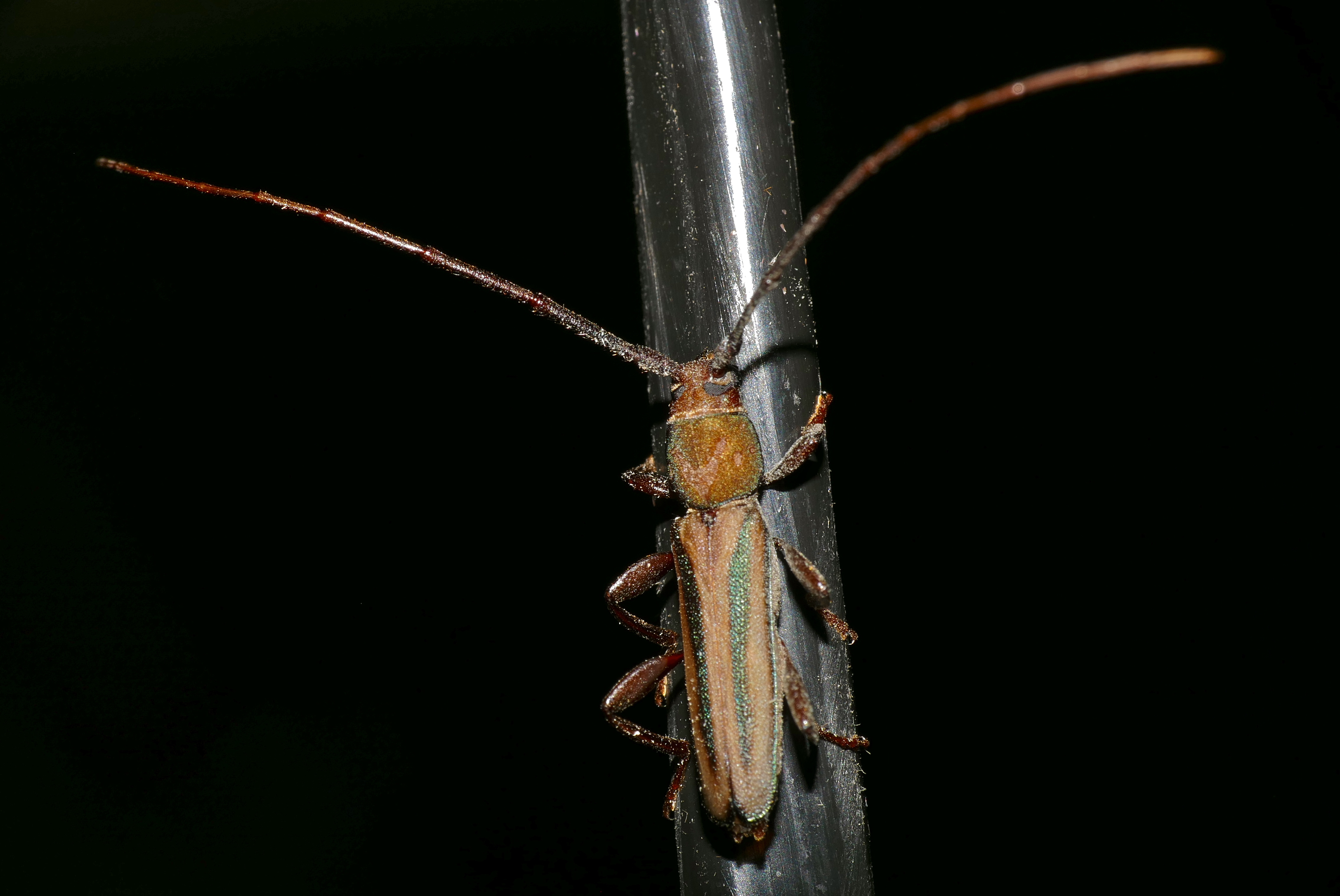 Letaba Camp, Kruger NP, SOUTH AFRICA